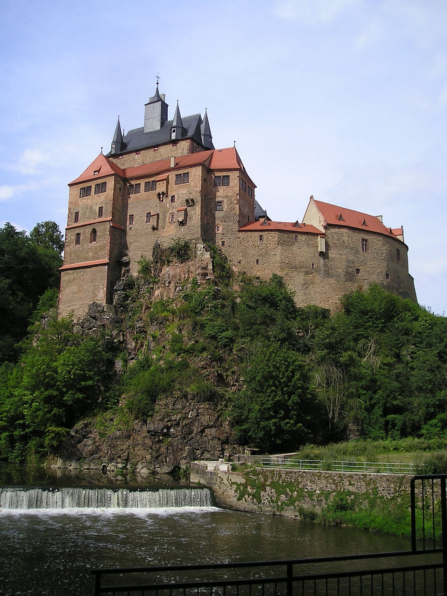 Burg Kriebstein (Sachsen) im Juli 2007 Creative Commons Licence BY 2.0 Quellenangabe / Credit: Photo by Maja Dumat